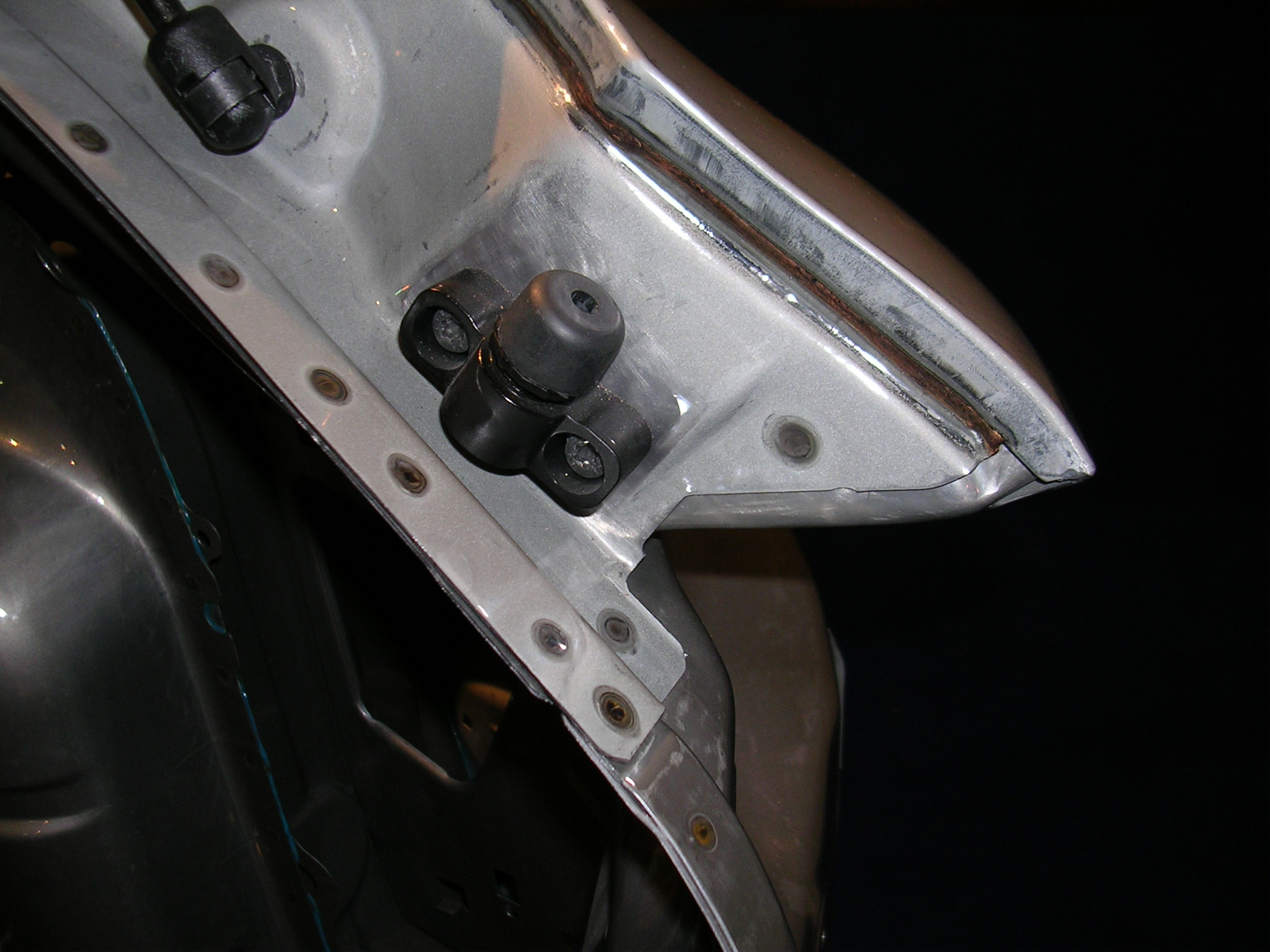 Plasmatronlöten und Punktschweißen von Seitenwandrahmen und Wasserkanal an der Heckklappe des Audi A3 auf der Messe "Schweißen und Schneiden" in Essen, 2005.